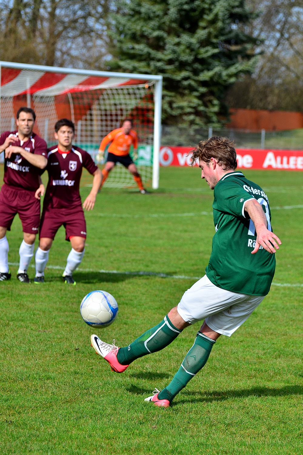 EVORA Arena, Hamm, Datum/Uhrzeit: 14.04.2013 16:36:43